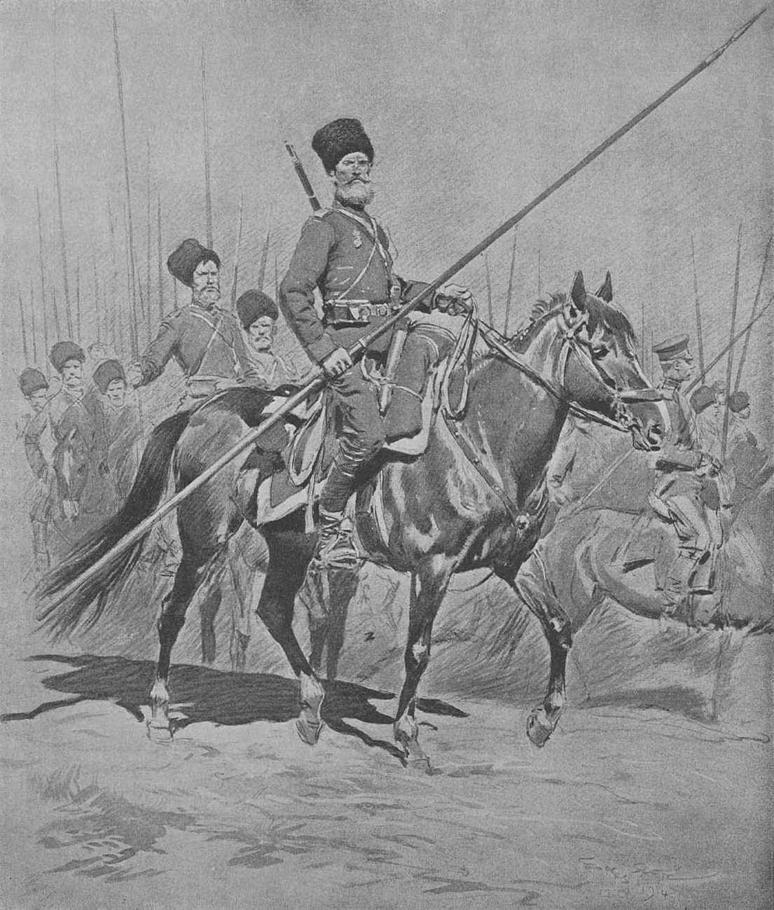 "В Пруссию!", картина, посвященная походу в Восточную Пруссию.